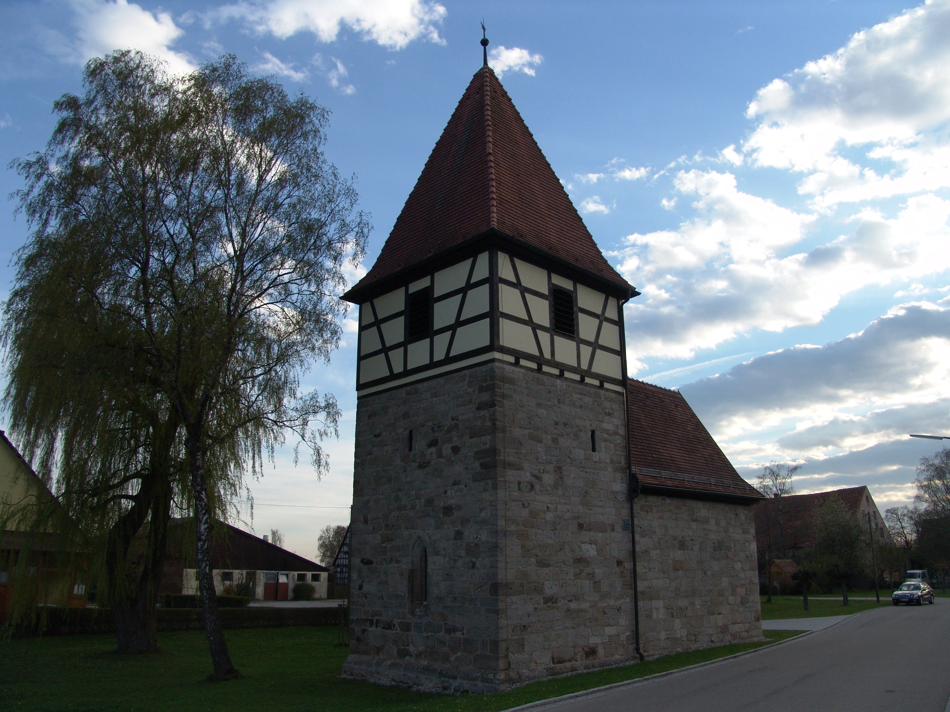 evang.-luth. Kirche St. Maria in Ostheim evang.-luth. Kirche St. Kilian in Zumhaus